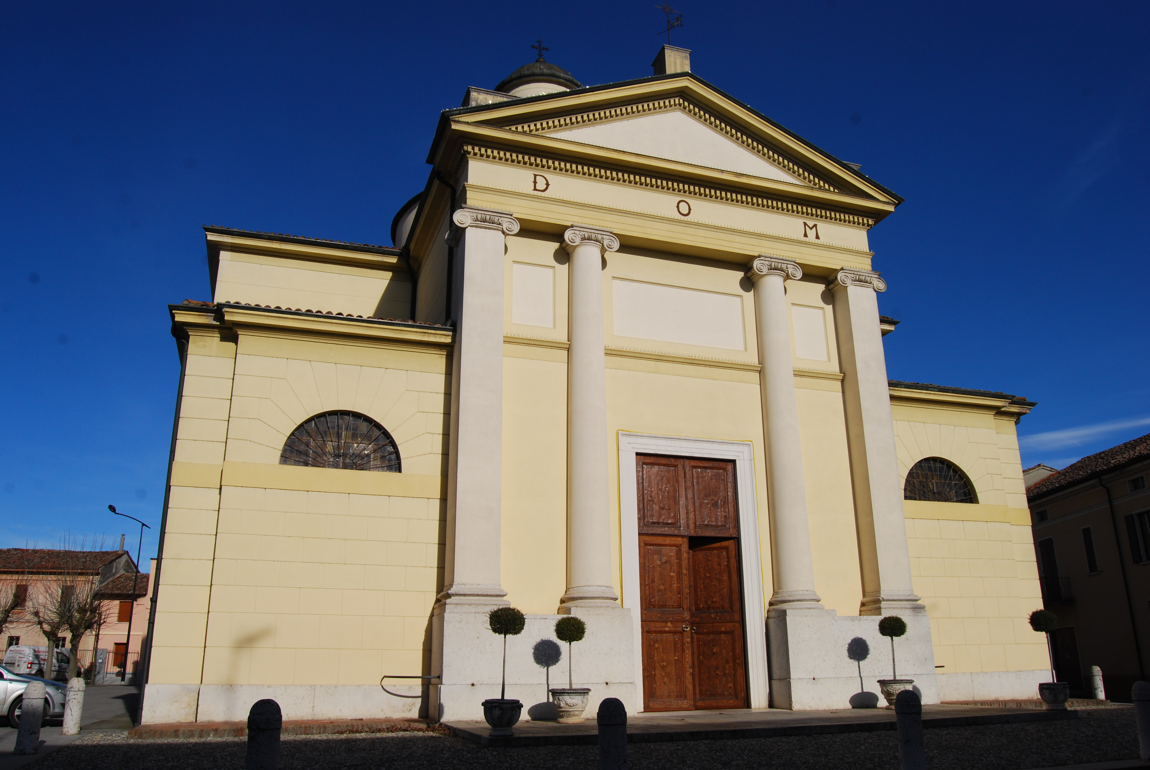 Spineda, chiesa parrocchiale di San Salvatore.